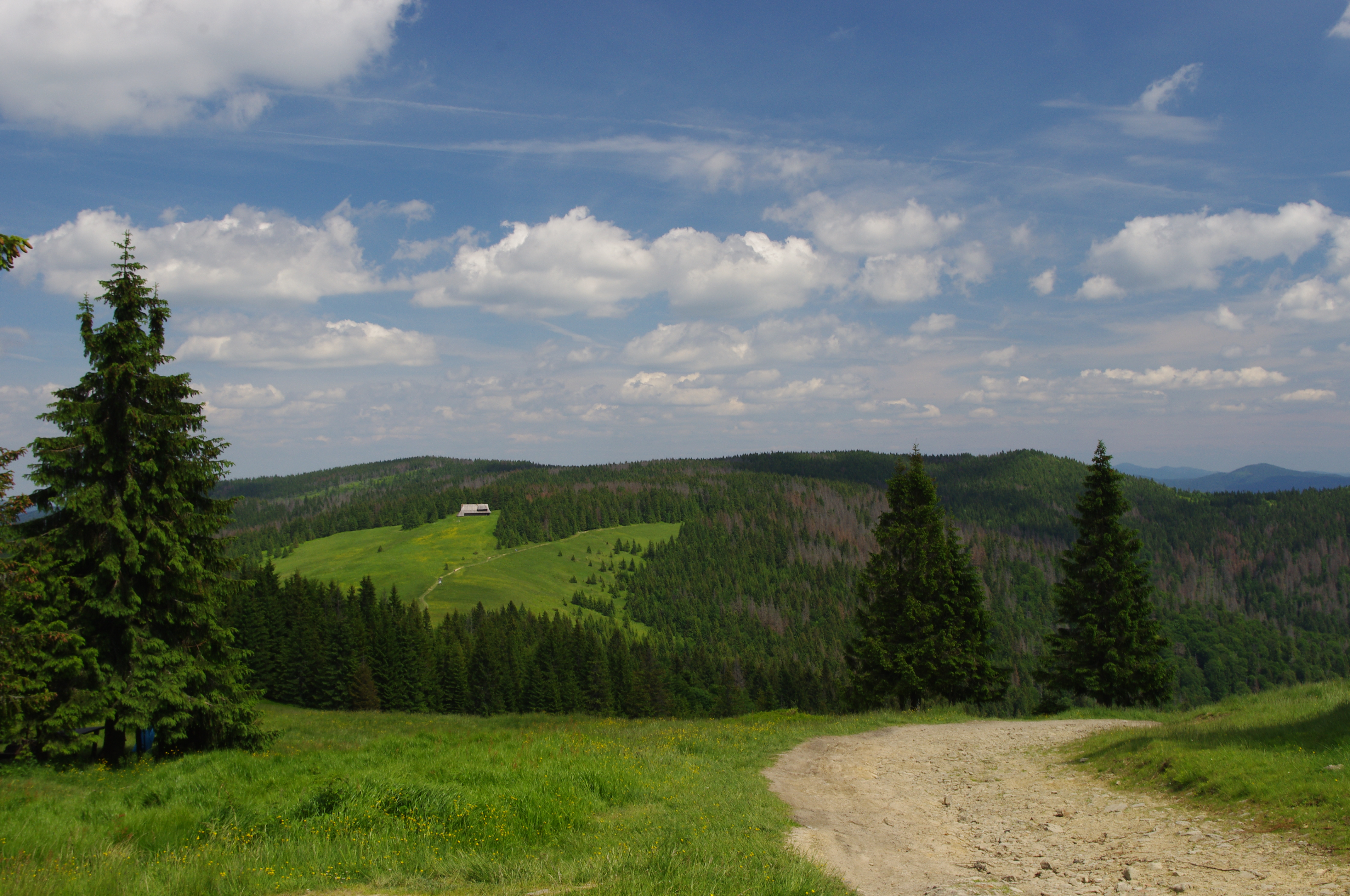 Widok spod schroniska na Turbaczu